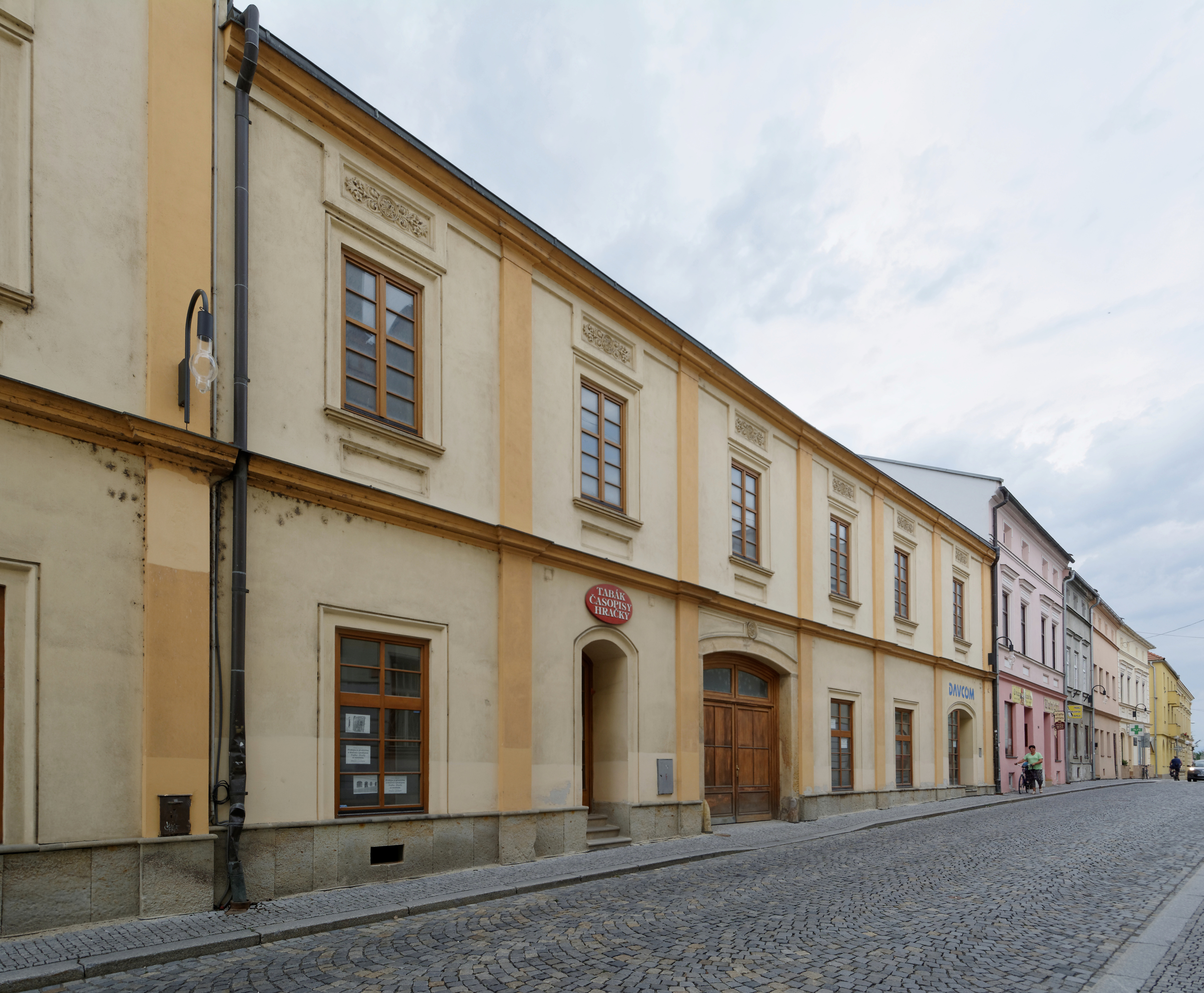 Langův dům, Litovel, Masarykova č.p. 769/2, měšťanský dům.